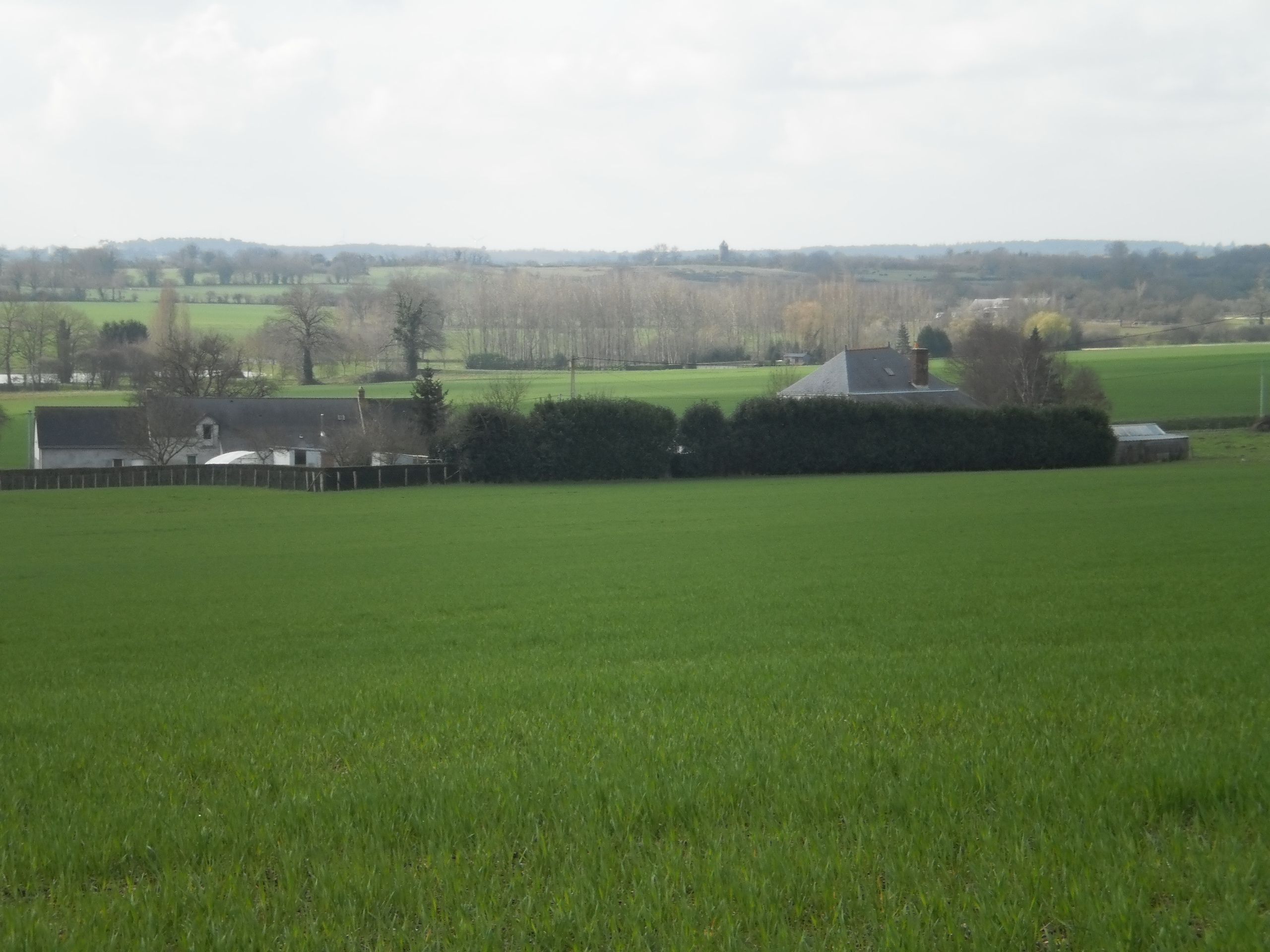 Le Pin (Loire-Atlantique, France) - paysage